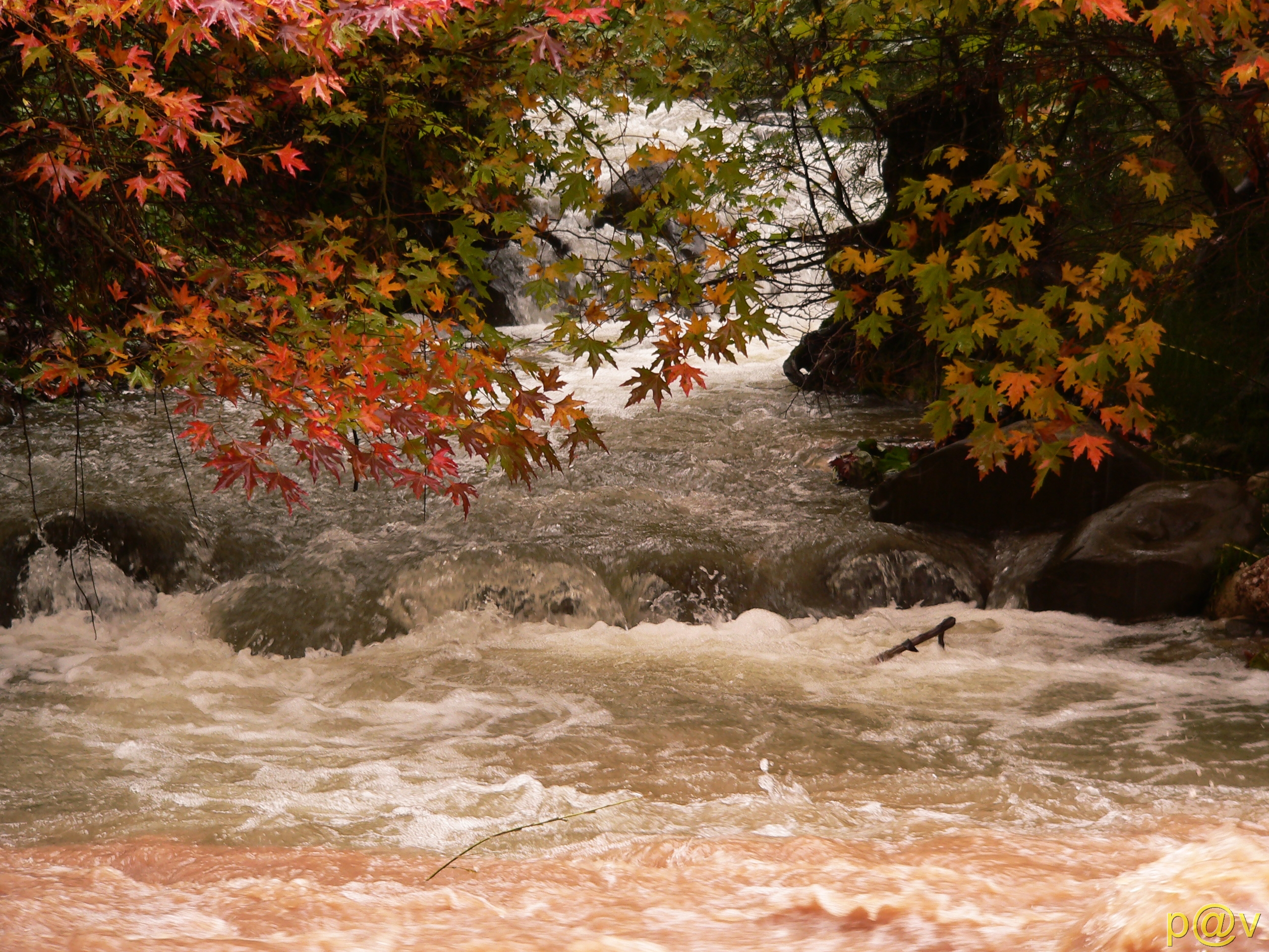 Αγριεμενα νερα ανοιξη